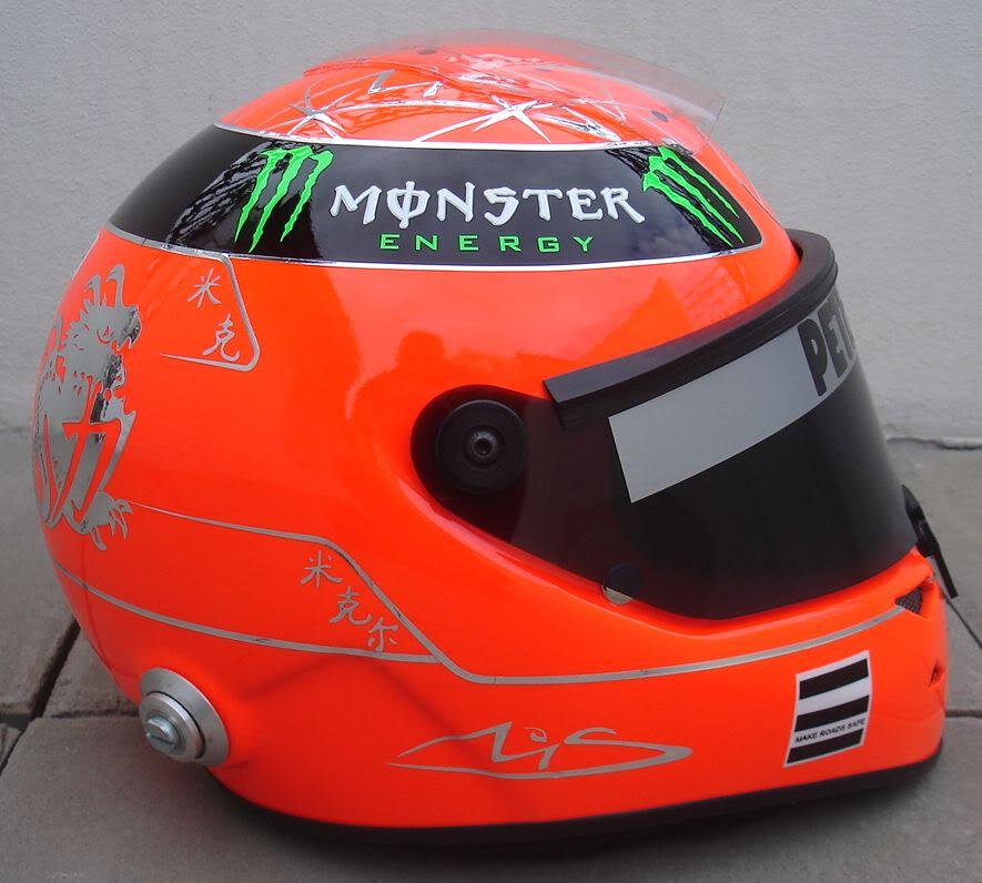 Helm Michael Schumacher di musim 2011